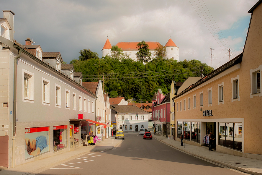 Der Marktplatz in Wörth an der Donau mit Schloss Wörth im Hintergrund.